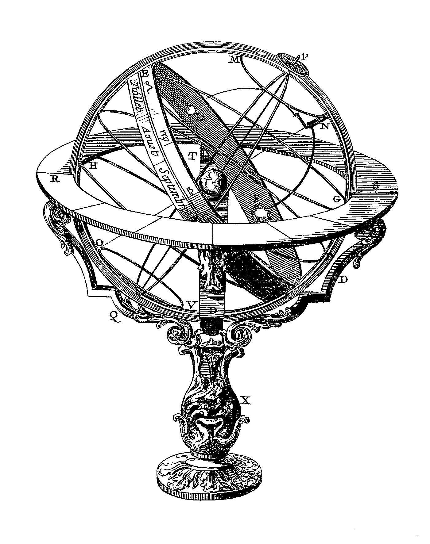 Sphère armillaire de l'Encyclopédie de Diderot et D'Alembert